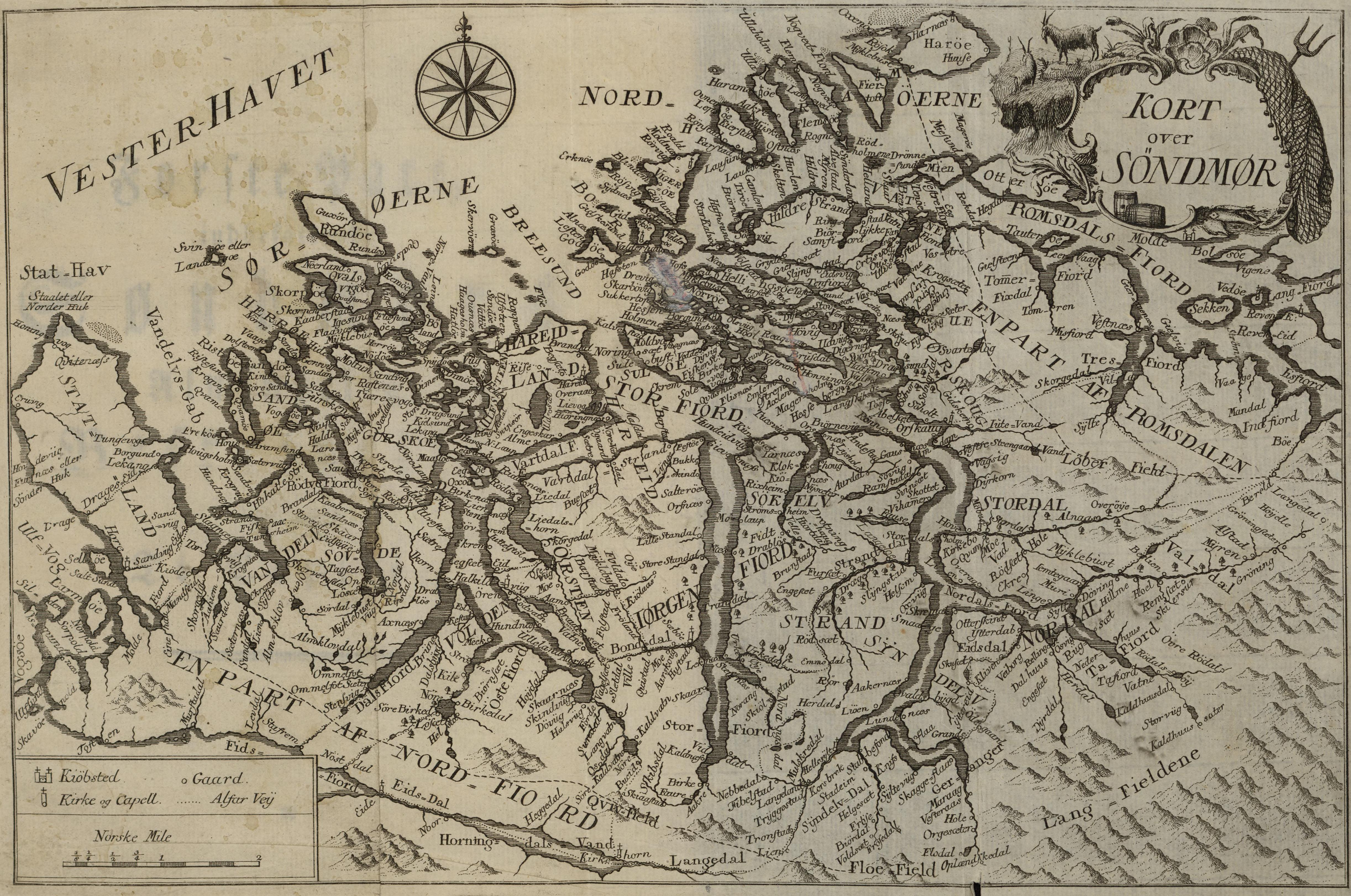 Illustrasjon hentet fra boken "Physisk og Oeconomisk Beskrivelse over Fogderiet Søndmør, beliggende i Bergens Stift i Norge" av Strøm, Hans og utgitt av Trykt hos Jonas LindgrenSorøe : Trykt hos Jonas Lindgren, 1762-1766 (Sorøe, 1762)